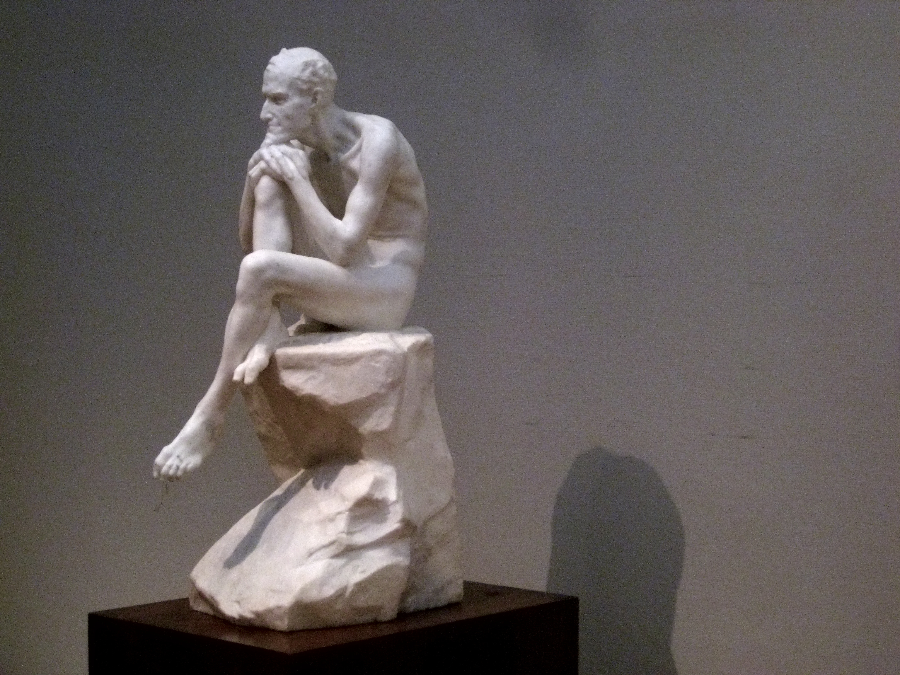 Марк Антокольский. "Мефистофель". После 1883 года. Мрамор. ГТГ. Уменьшенное повторение статуи 1883 года из собрания ГРМ.